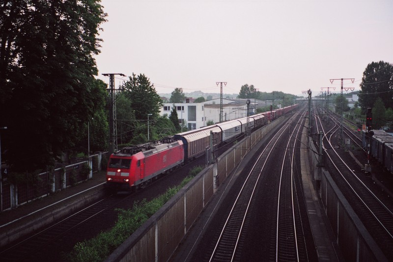 Bahnhof und Abzweig Ihringshausen mit Güterzug Richtung Eichenberg. Außen die Gleise der Halle-Kasseler Eisenbahn, innen Schnellfahrstrecke Hannover–Würzburg - Ihringshausen railway station and junction; eastbound cargo train. Tracks Halle-Kassel on the left and on the right, hight speed line Hanover-Wuerzburg in the middle.